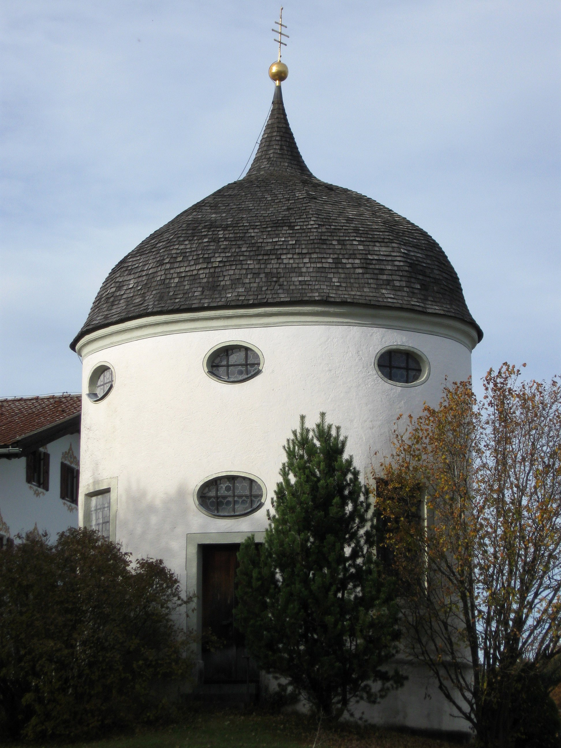 Reichersdorf, Irschenberg; Allerheiligenkapelle, Zentralbau 1644